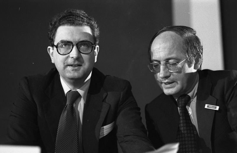 27. Bundesparteitag der F.D.P in Frankfurt am Main